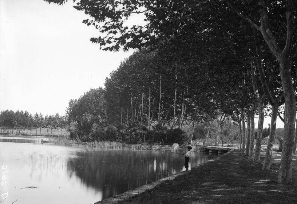 Imatge